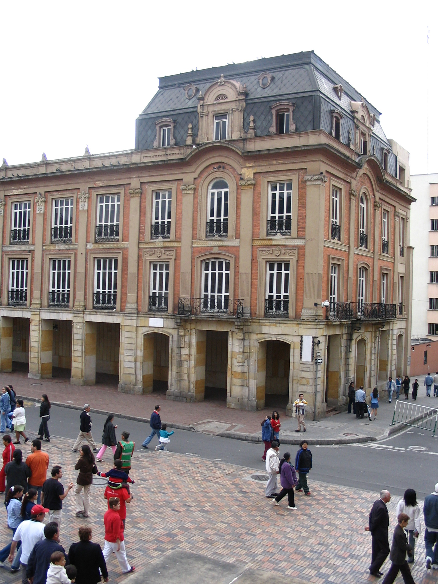 Lievano Building, City Hall of Bogotá. Edificio Liévano, Sede de la Alcaldía Mayor de Bogotá